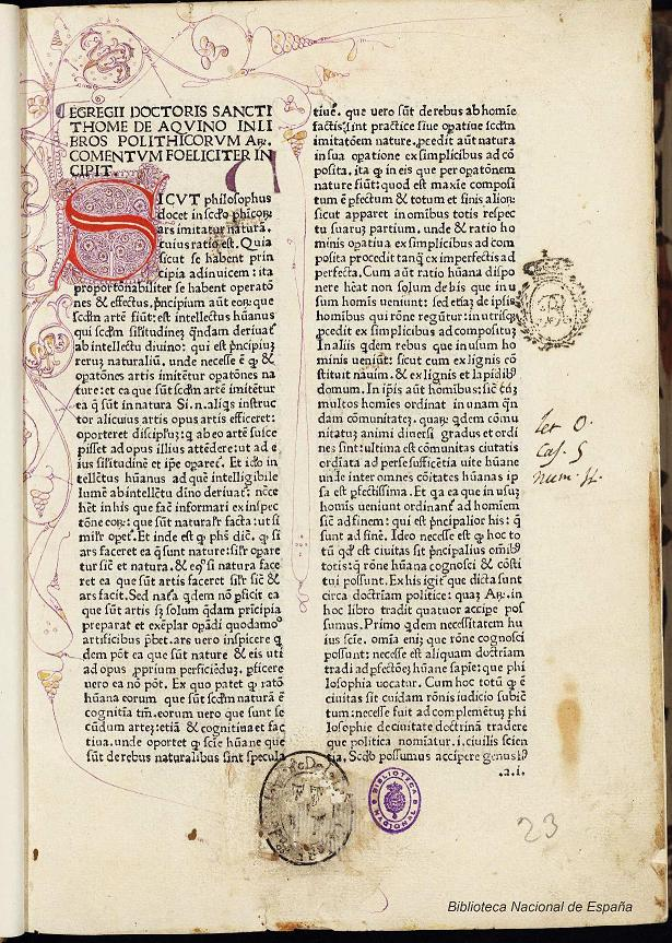 Commentaria in Aristotelis Politicorum libros ad. Petrus de Alvernia; ed. Johannes Ferrarius Autor: Tomás de Aquino, Santo ; Pierre d'Auvergne Ferrarius, Johannes (fl. 1478) Fecha: 1478 Datos de edición: Apud Barchinonam urbem clarissimam Petro Bruno et Nicolao spindeler germane gentis (Brun, Pedro) (Spindeler, Nicolás)